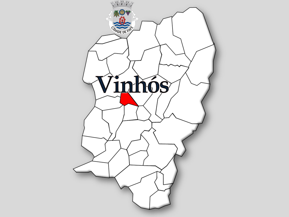 Censos 1864/2011